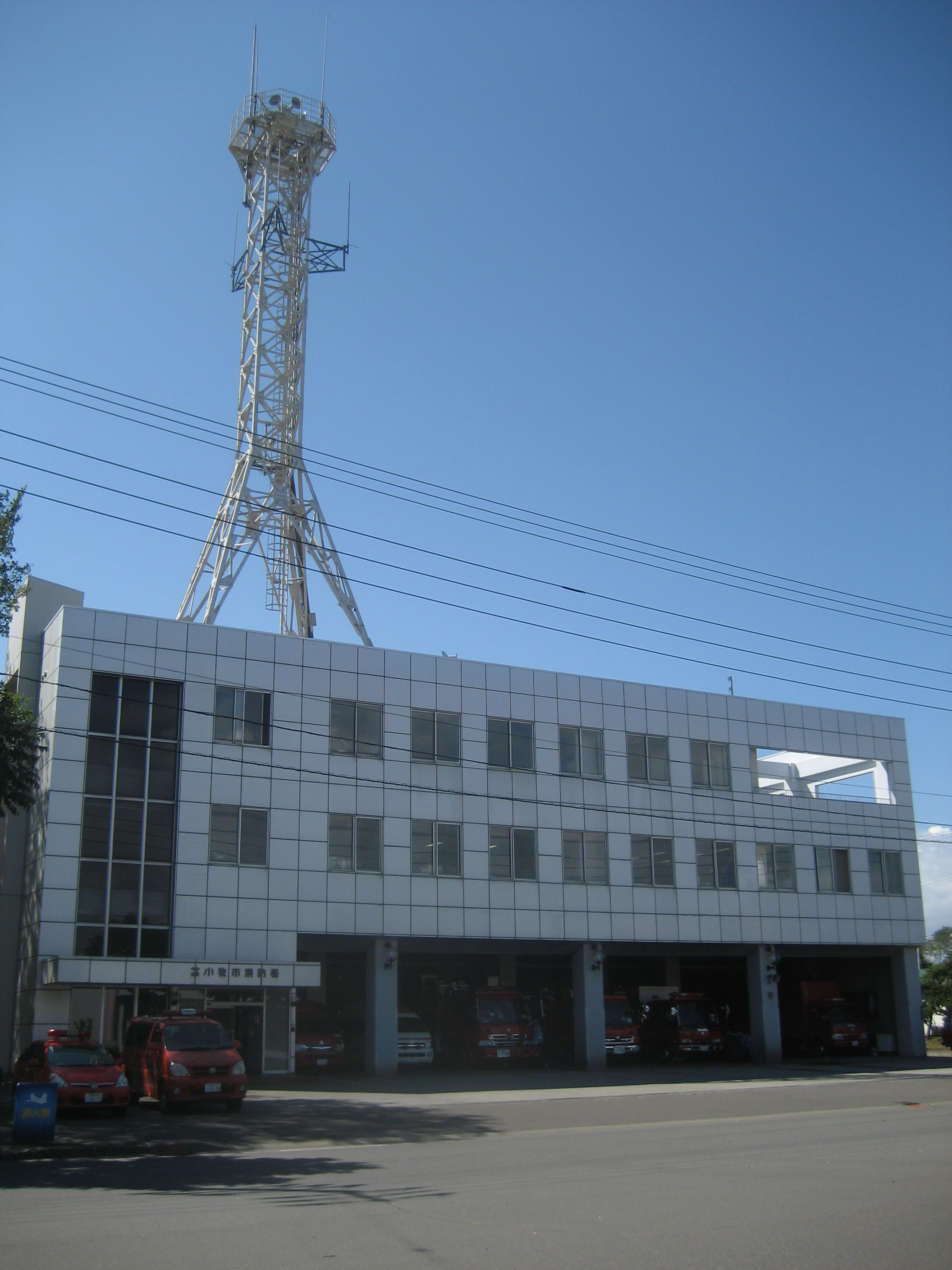 苫小牧市消防本部・消防署庁舎